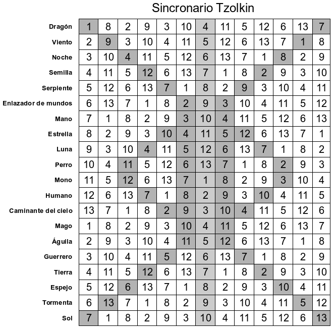 Matriz armónica, o tzolkin con los sellos.